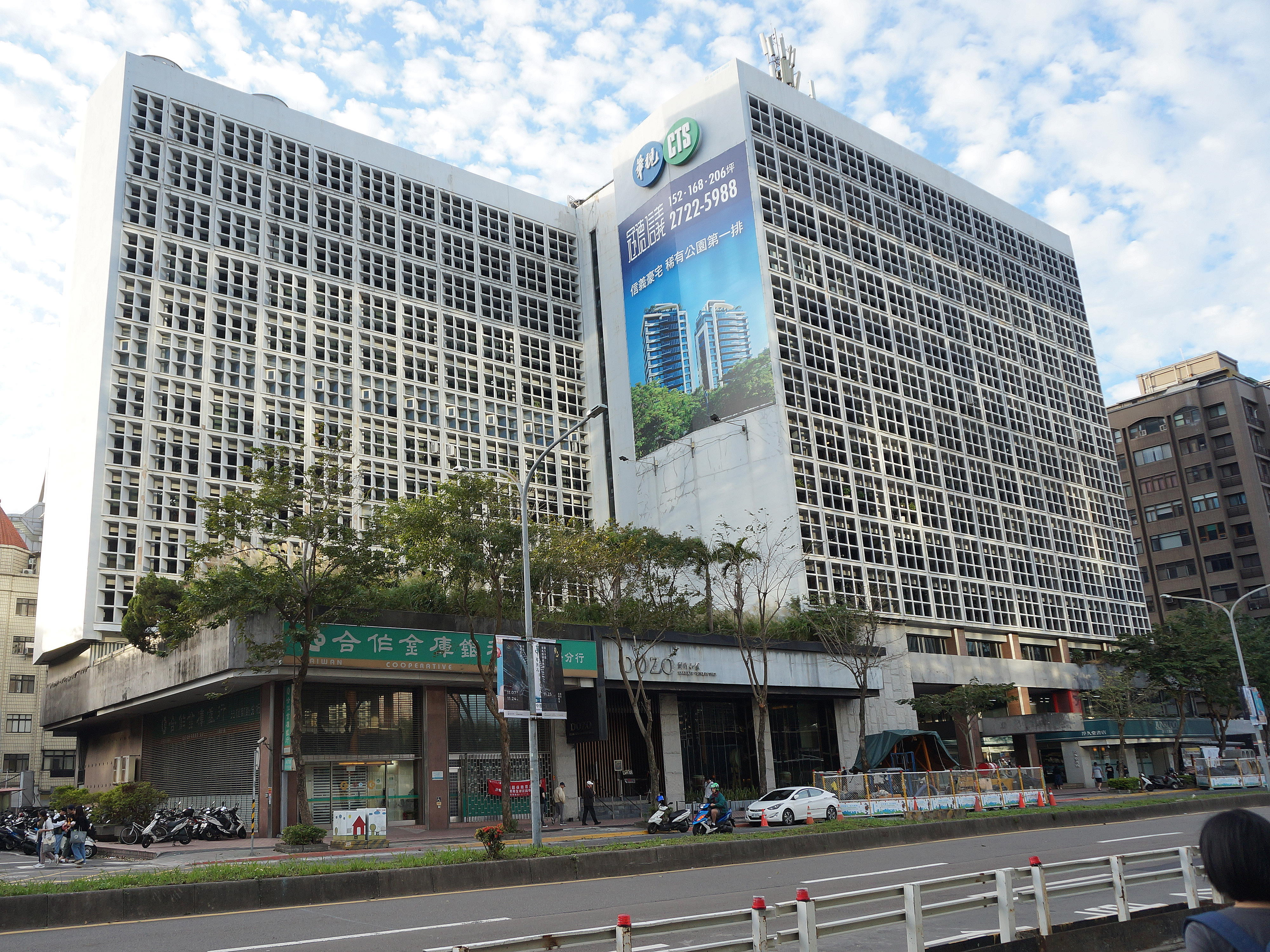 華視光復大樓左前方概觀。